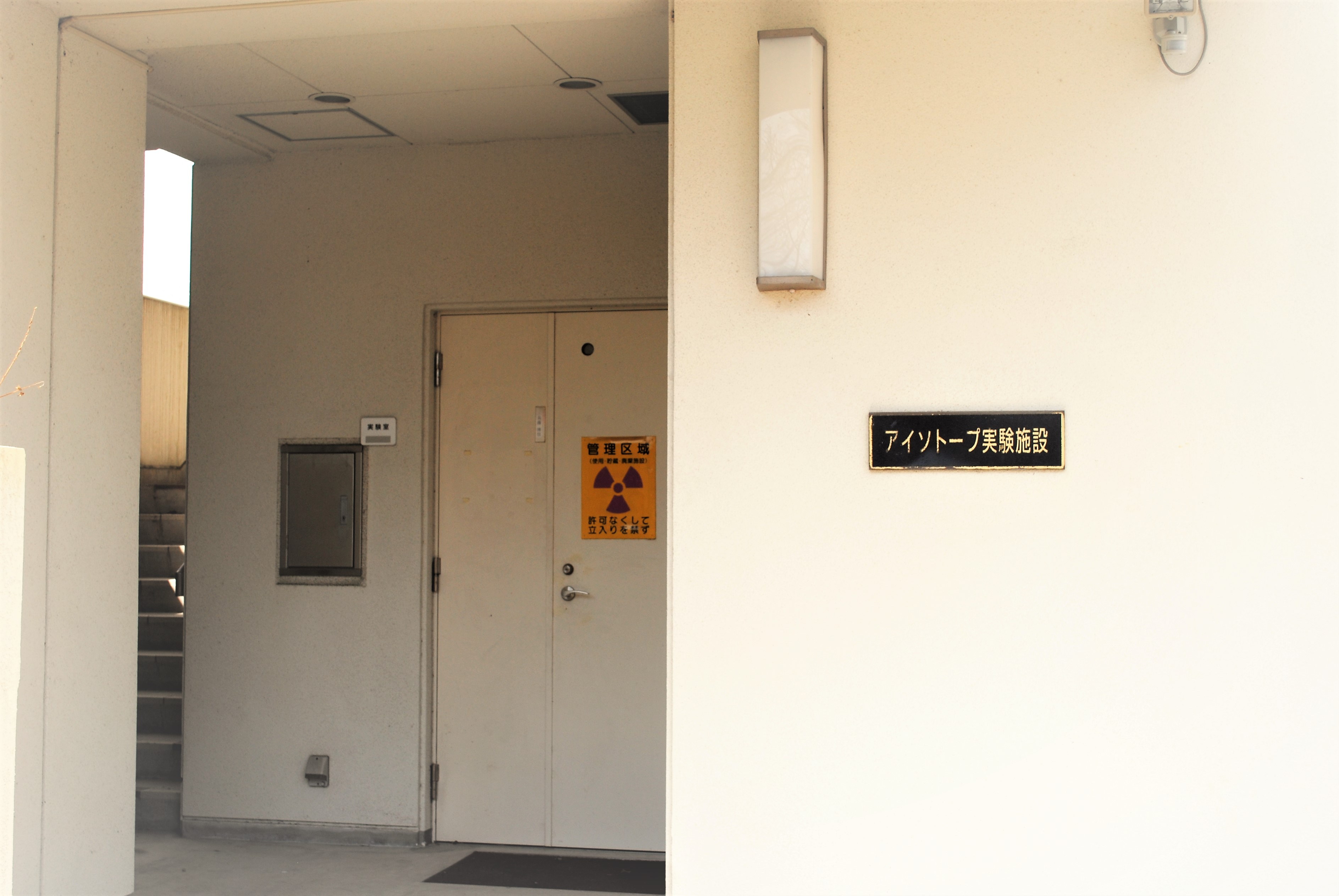 岡山理科大学敷地内（岡山市北区理大町） 放射物質貯蔵のため要注意